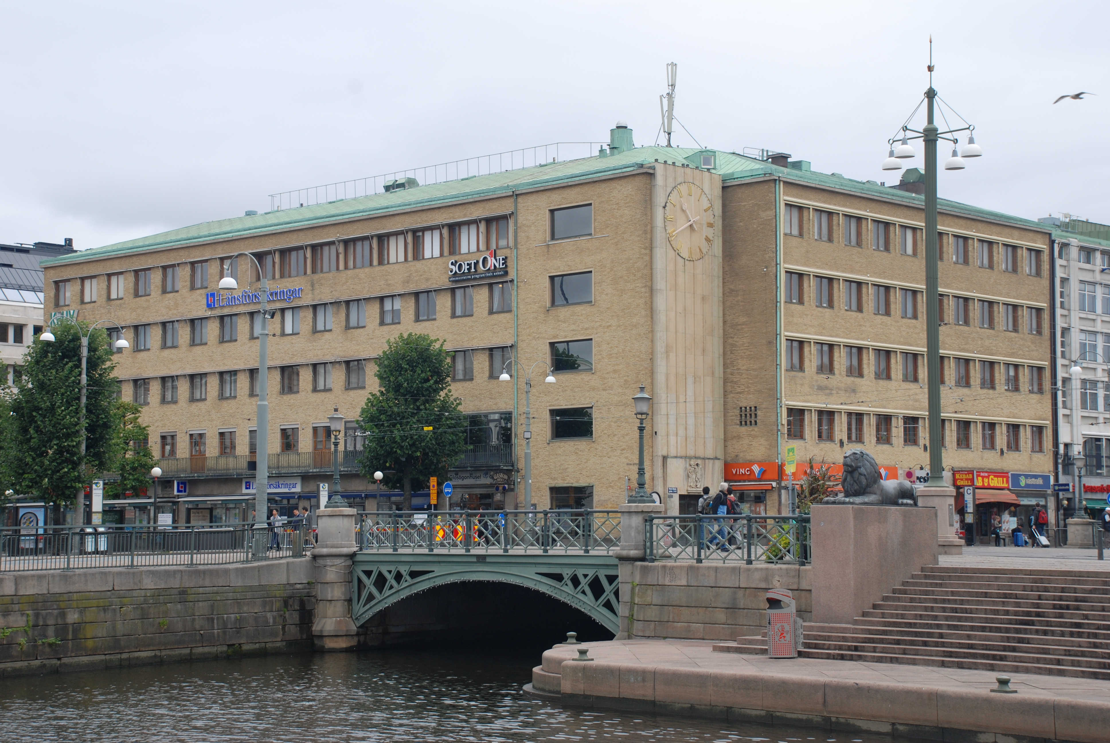 Thulehuset vid hörnet av Norra Hamngatan 18 och Östra Hamngatan 30-34 vid Brunnsparken i stadsdelen Nordstaden i Göteborg.